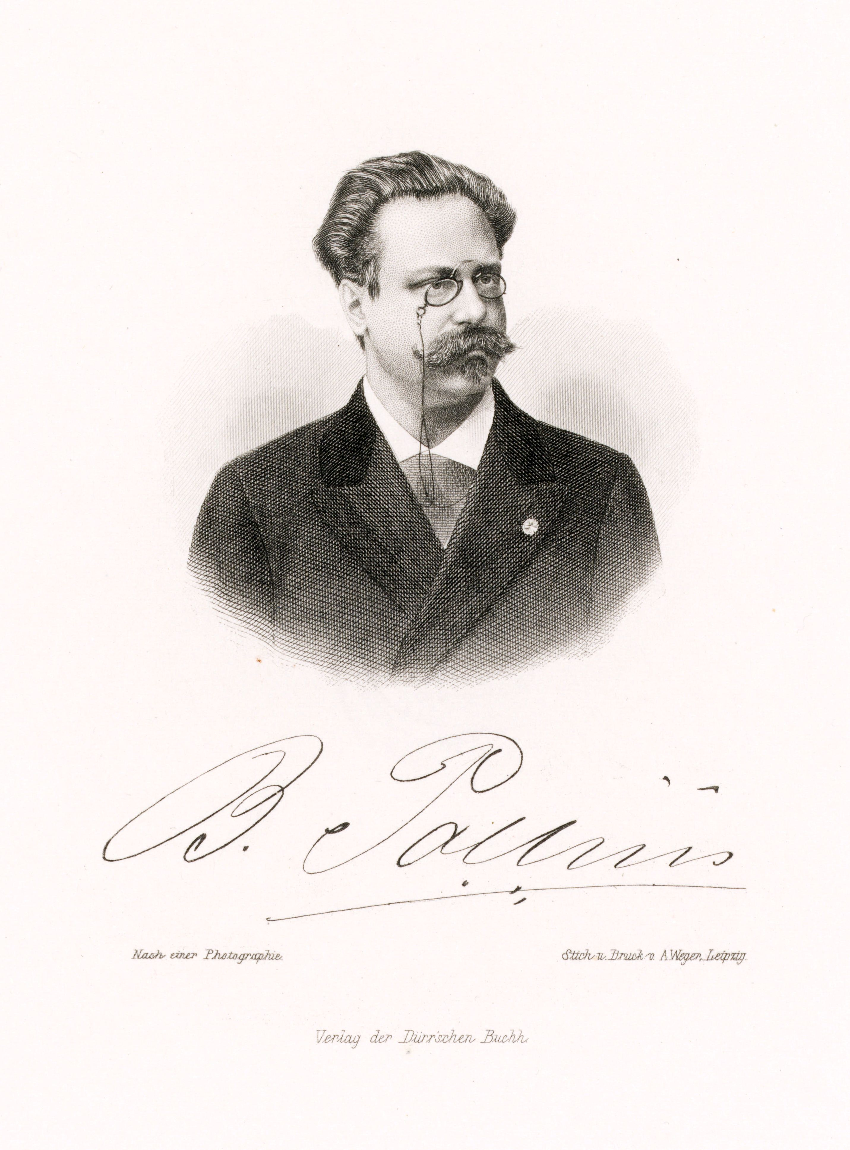 B. Pollini